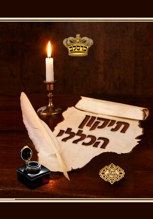 שער התיקון הכללי - בהוצאת קרן הדפסה היכל הקודש